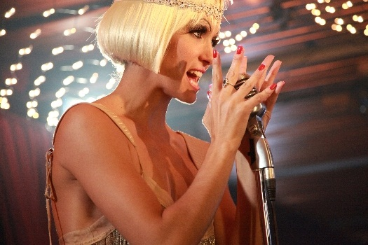 חן יאני מתוך סרטו של דורון ערן נמס בגשם - צילום עדי הררי